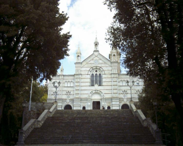 Santuario di Montallegro